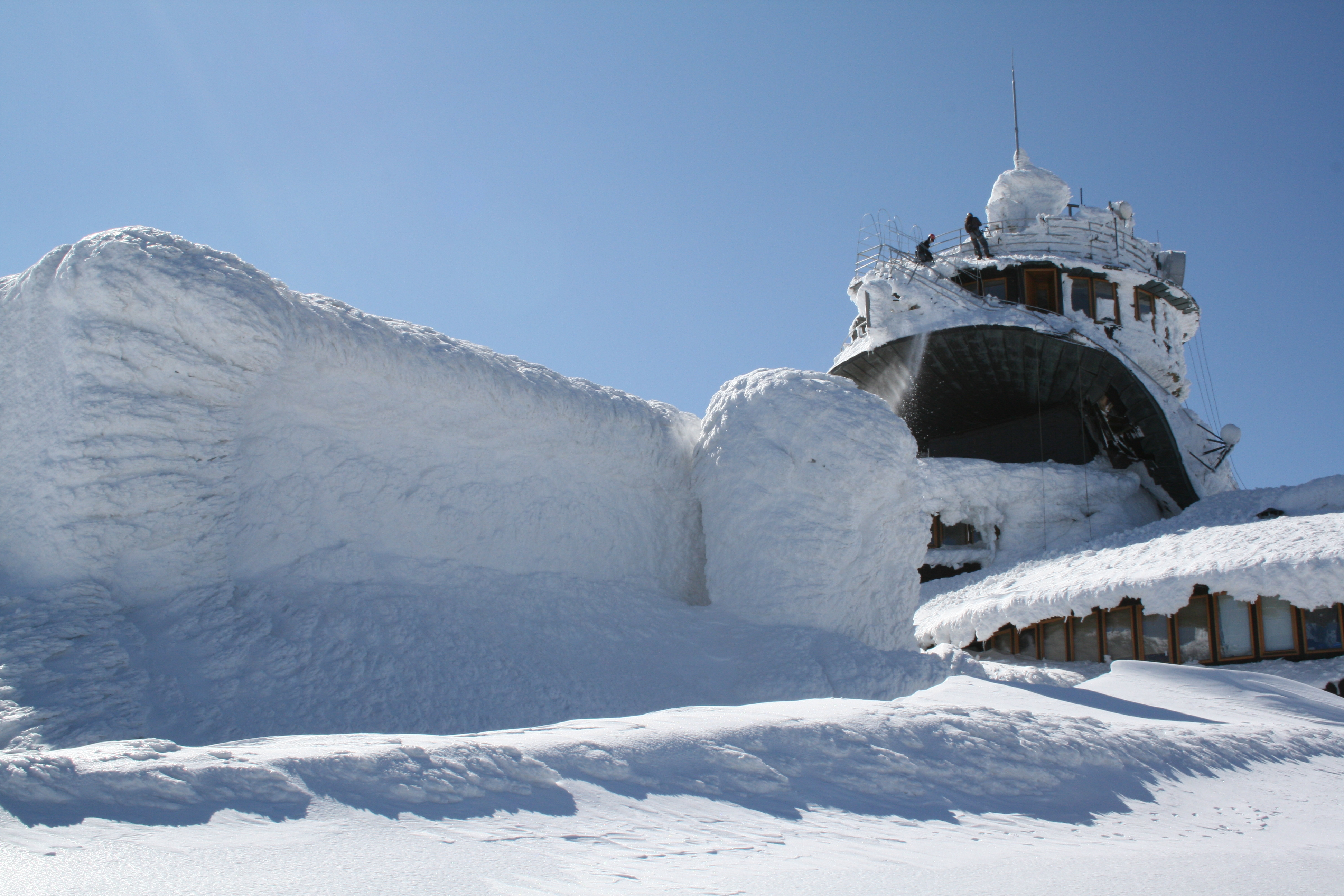 Zdjęcie krótko po katastrofie budowlanej